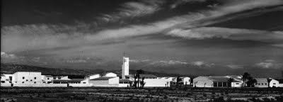 hola hola